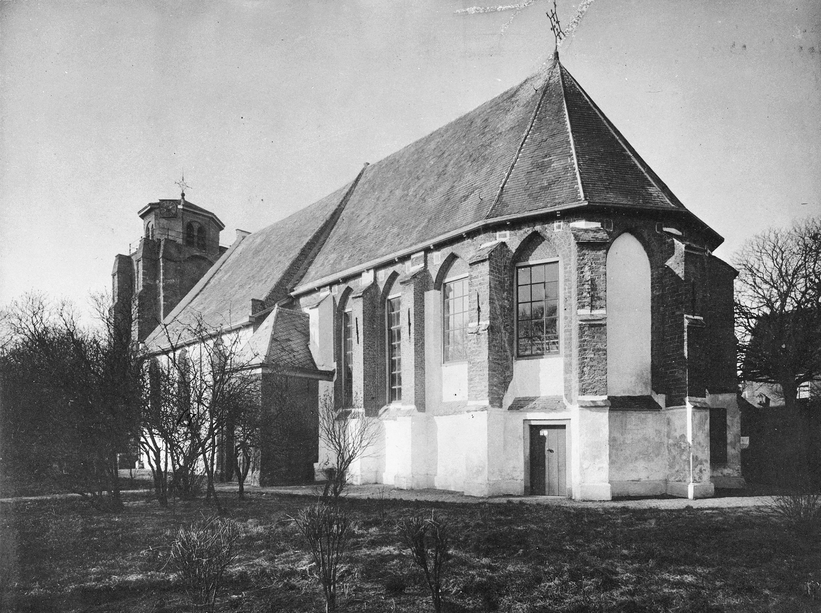 Kerk voor de verbouwing tussen februari 1903 en augustus 1903.